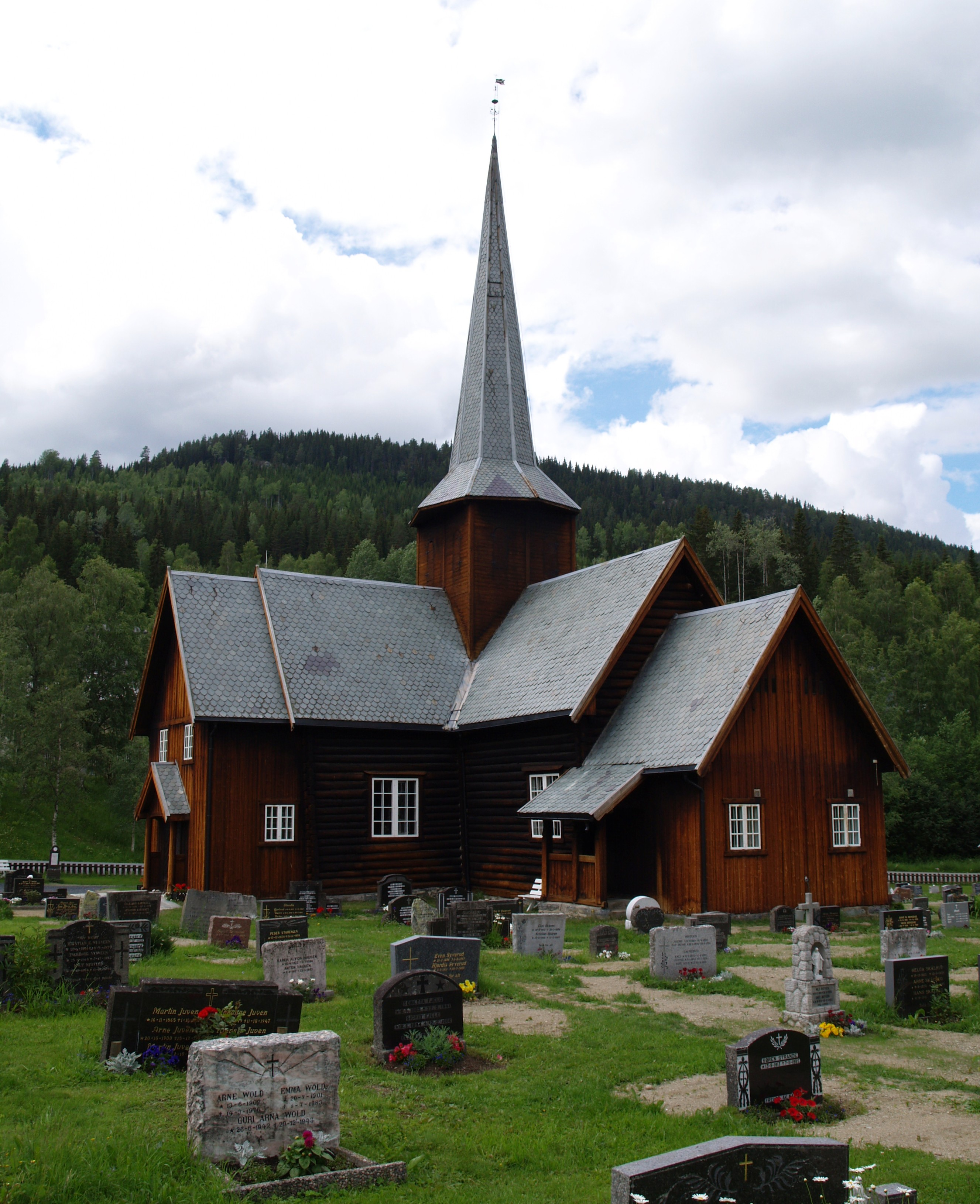 Bruflat kirke, Etnedal. See Bruflat kirke.